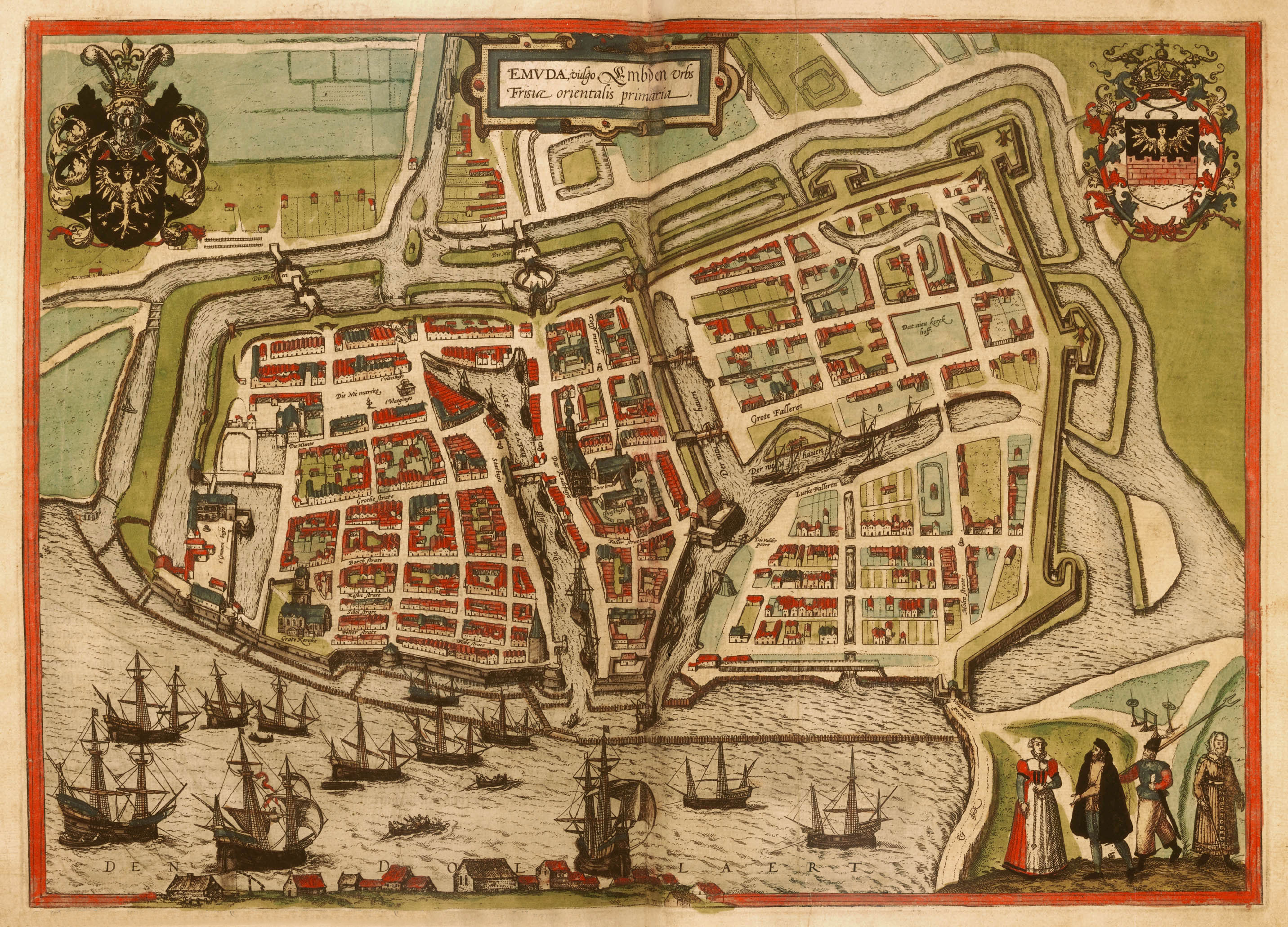 Emden 1575 (Braun Hogenberg, Band II, 1. Auflage)